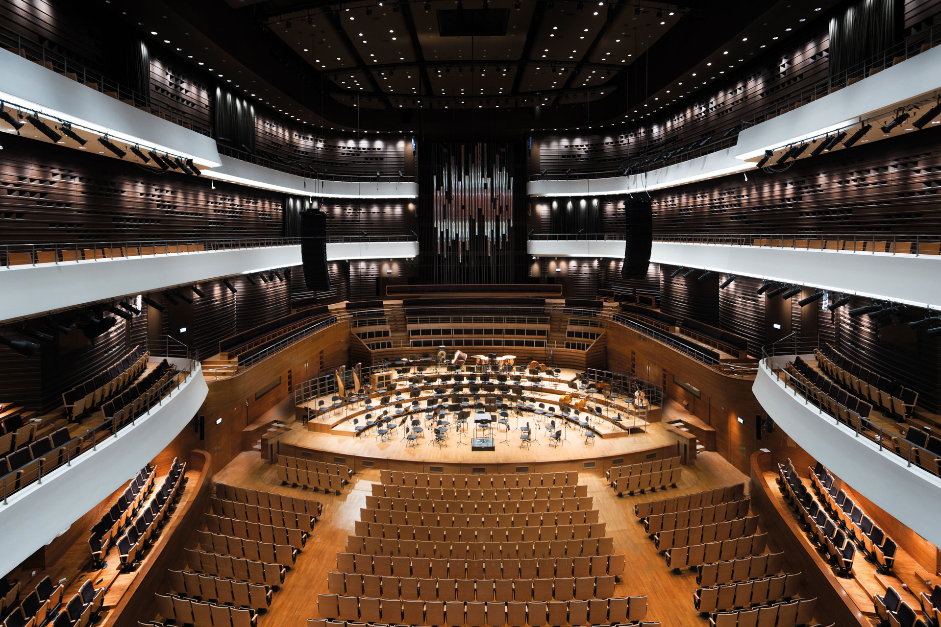 Narodowe Forum Muzyki im. Witolda Lutosławskiego we Wrocławiu